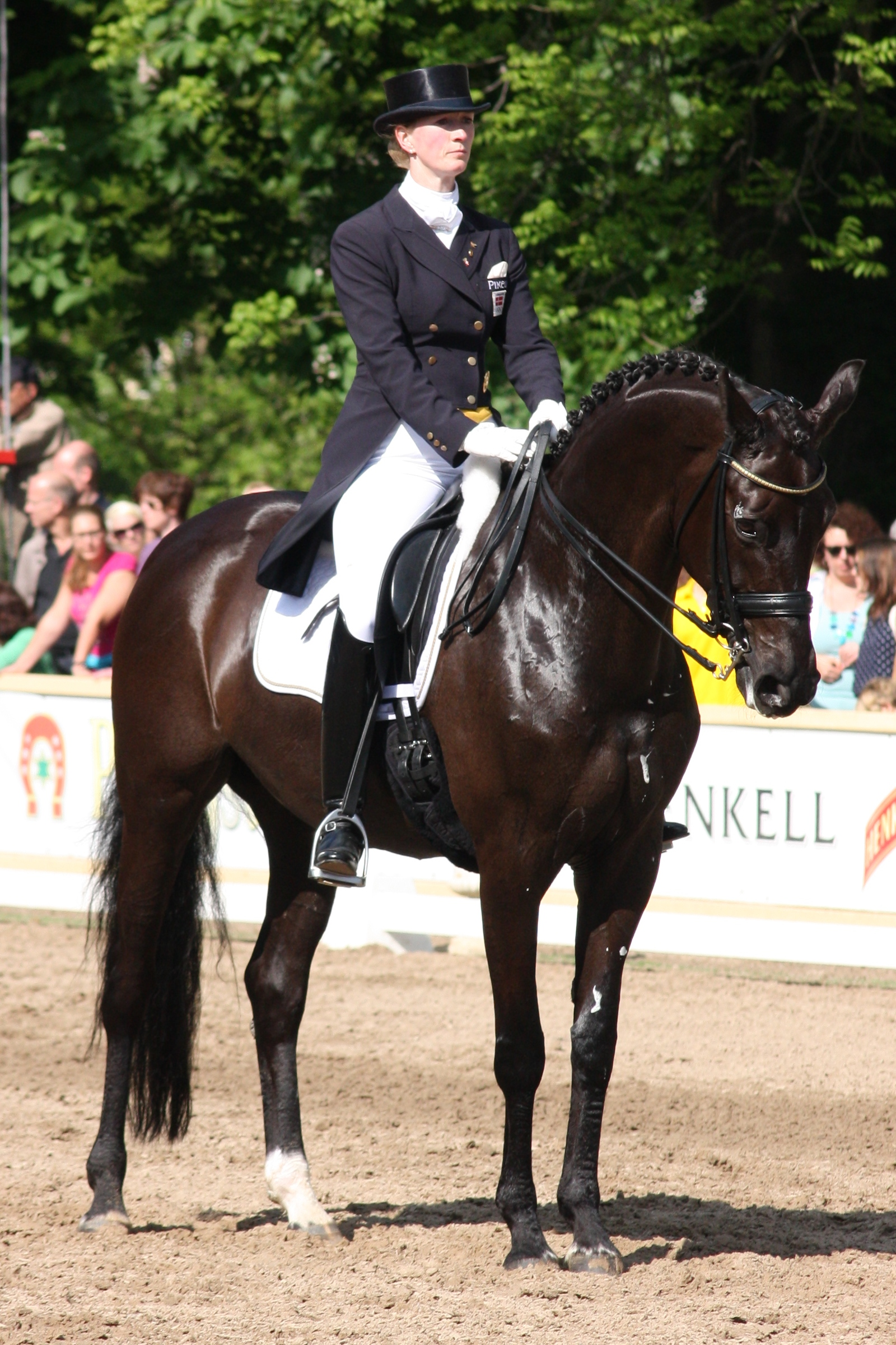 77. Internationales Pfingstturnier Wiesbaden 2013, CDI **** Dressurprüfung Grand Prix de Dressage, Sayn-Wittgenstein,Nathalie zu mit Fabienne Personality rights warning Although this work is freely licensed or in the public domain, the person(s) shown may have rights that legally restrict certain re-uses unless those depicted consent to such uses. In these cases, a model release or other evidence of consent could protect you from infringement claims.